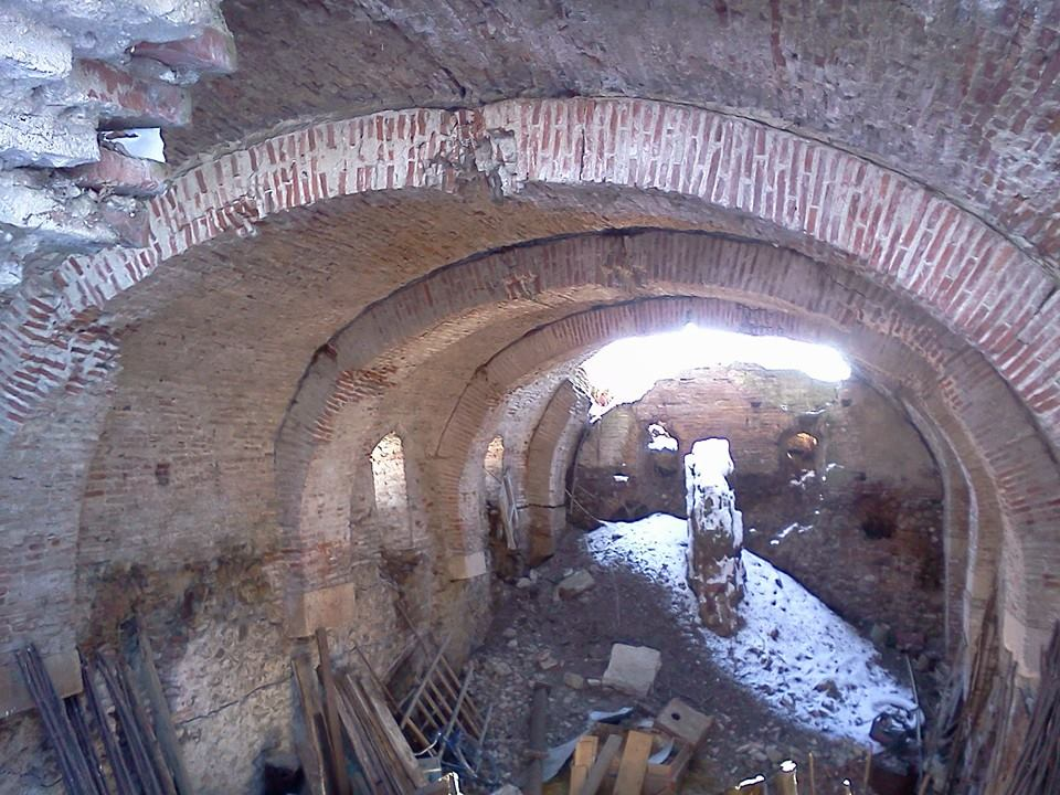 Ruinele conacului spătarului Mihail Cantacuzino